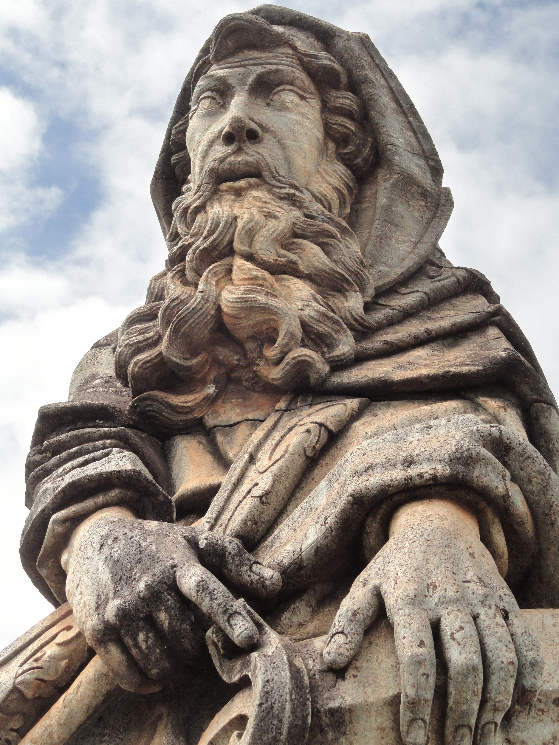 Santuário de Bom Jesus de Matozinhos: conjunto arquitetônico, paisagístico e escultórico. Aleijadinho: profeta Isaías